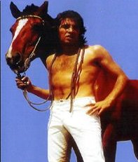 Sandro de América. Foto en poster de película Gitano (1969)